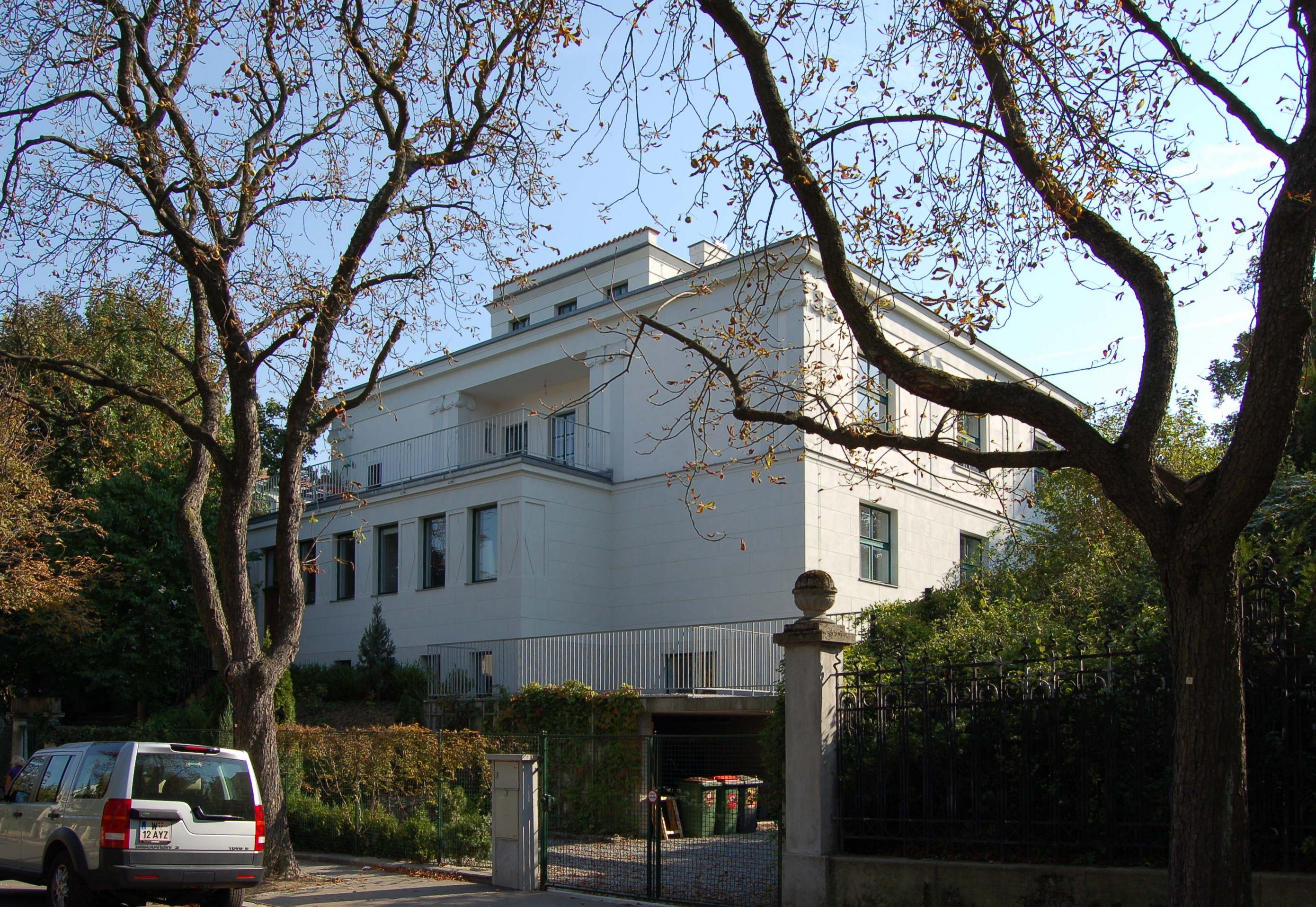 Die Graßberger Villa in der Braungasse 41 in Wien-Hernals.